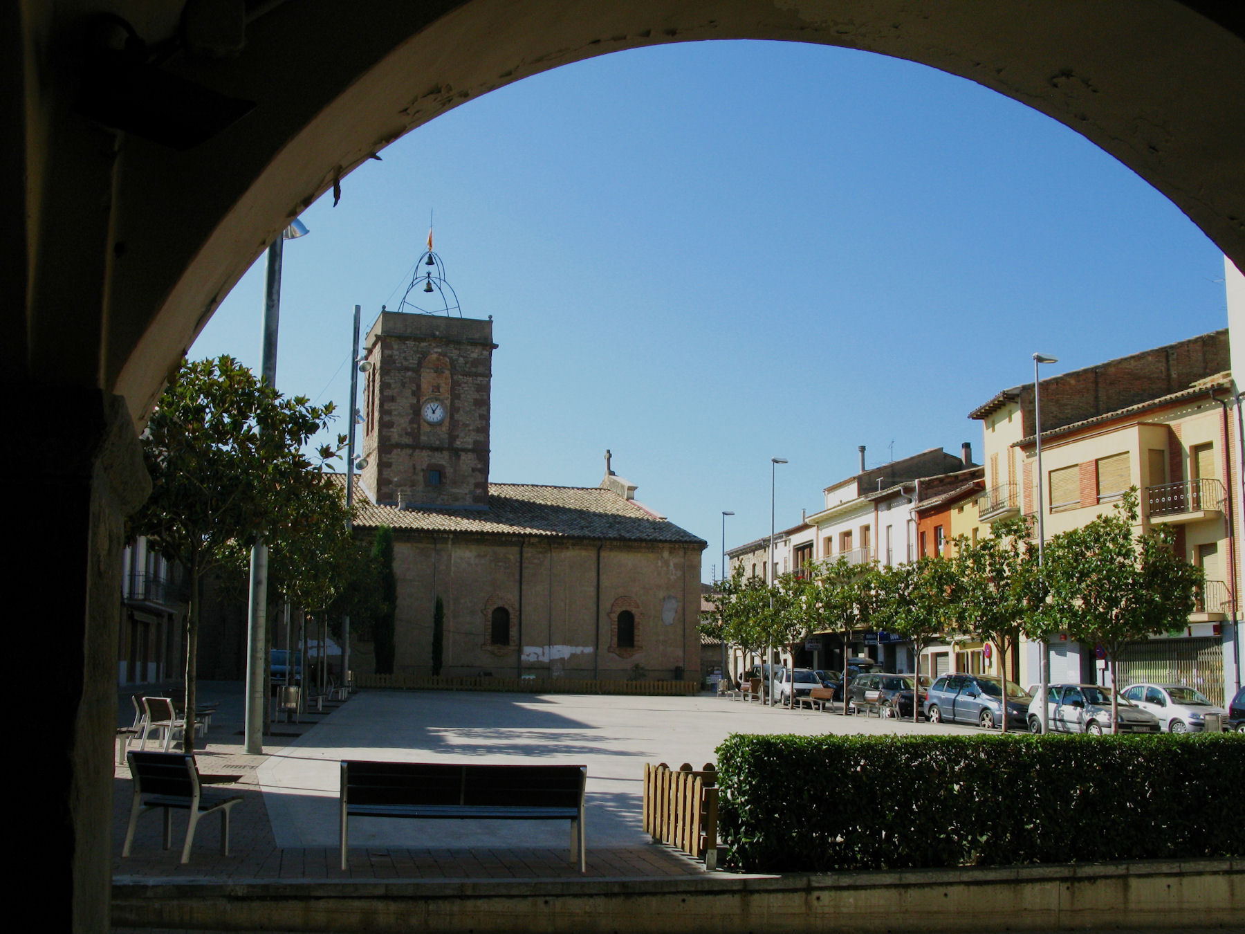 Pl. Major d´Avinyó - Avinyó